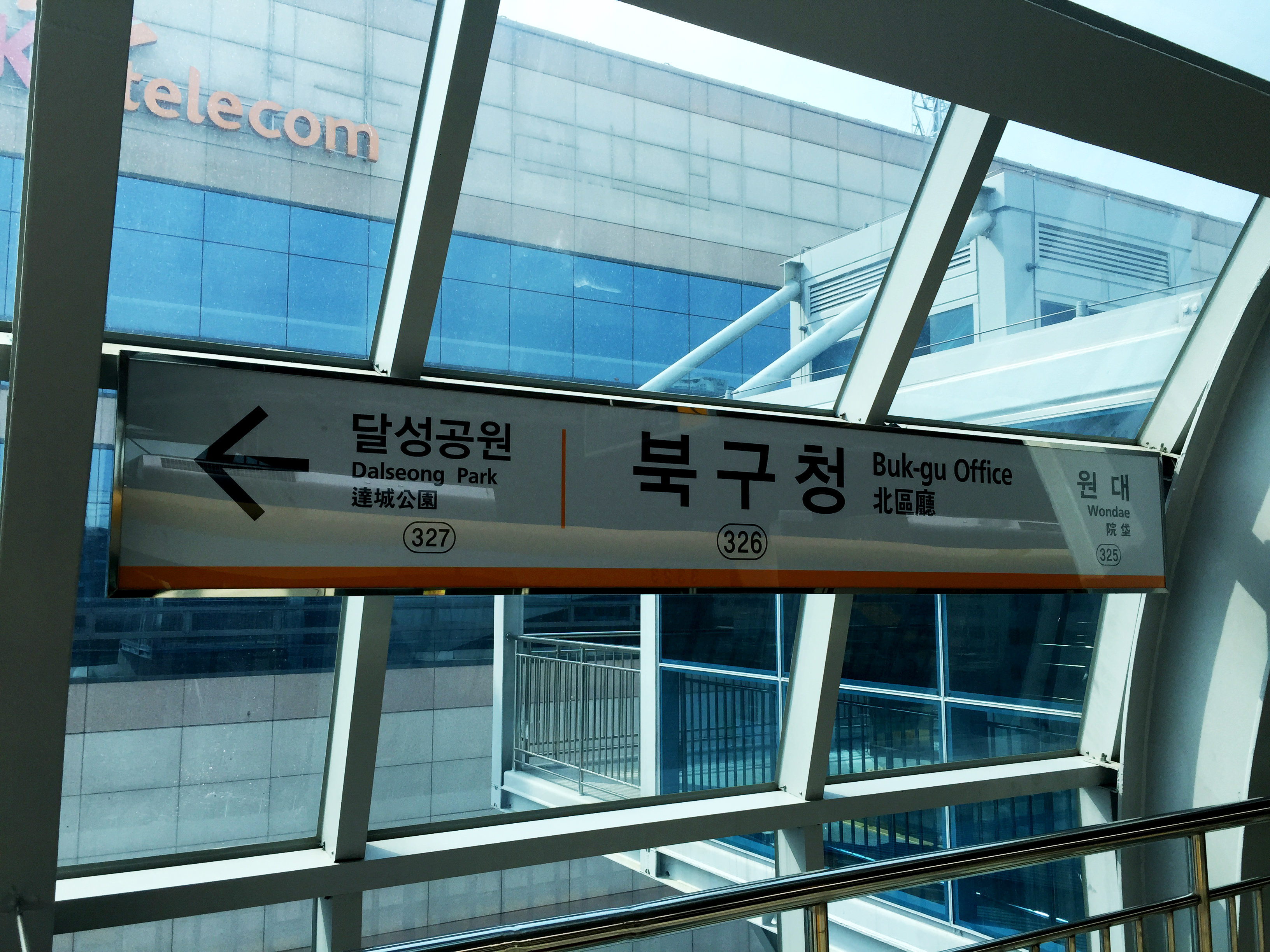 북구청역 역명판